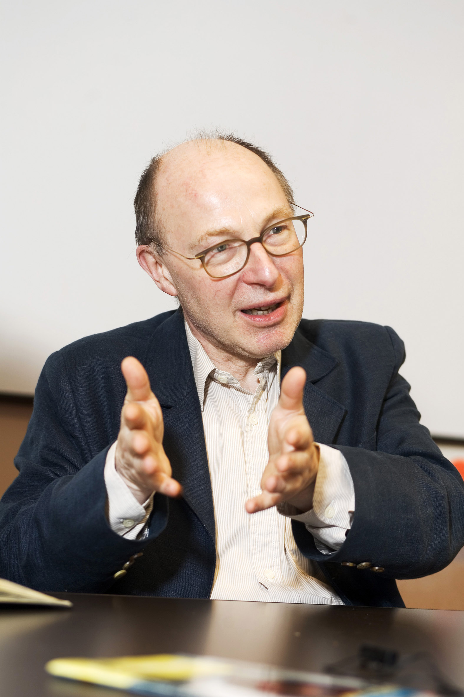 Herbert Hrachovec. Im November 2006 fand ein Gespräch über das öffentliche Interesse an wissenschaftlicher Arbeit statt. Bild aus dem AKH (Abteilung Hämatologie).